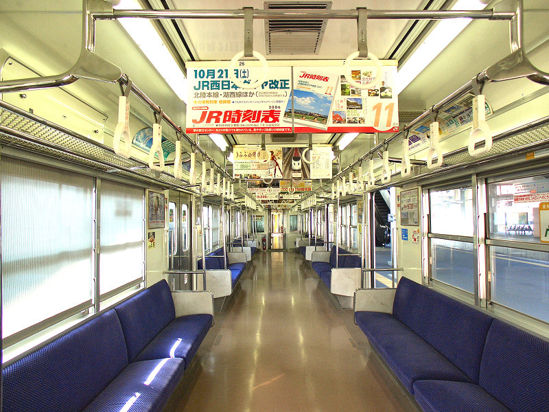 国鉄103系電車･クハ103-1514